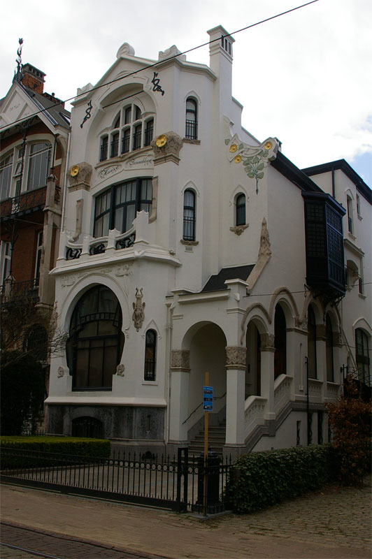 Cogels-Osylei 50, Zurenborg area of Antwerp